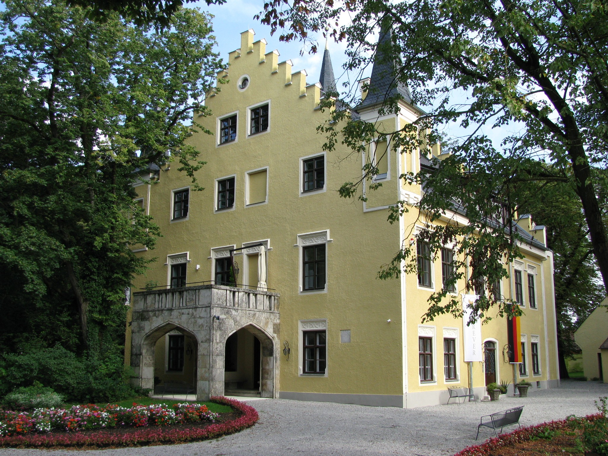 Schloss Freiham im Westen Münchens nach der Sanierung 2009/10